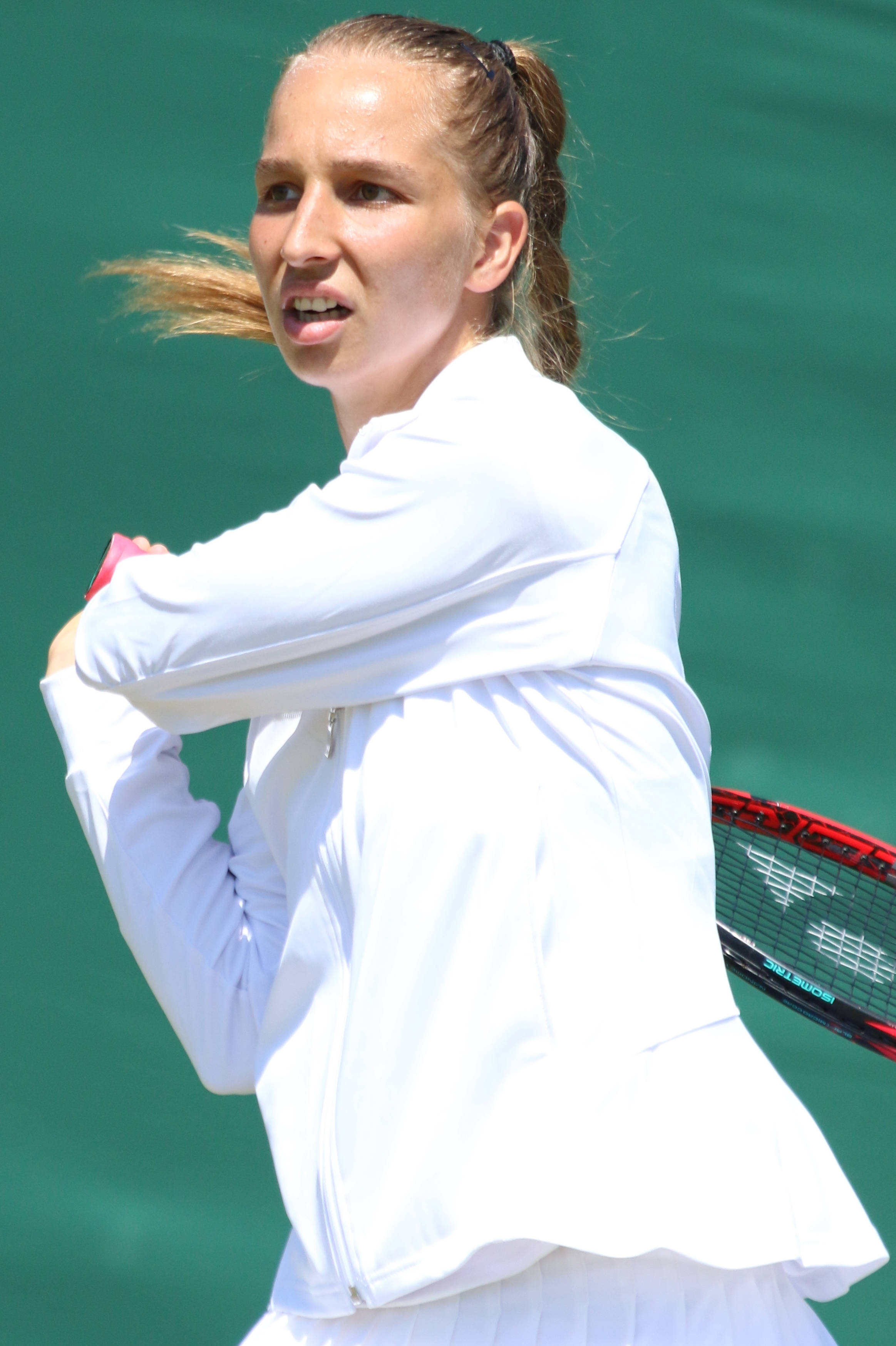 Korpatsch WMQ18 (6)